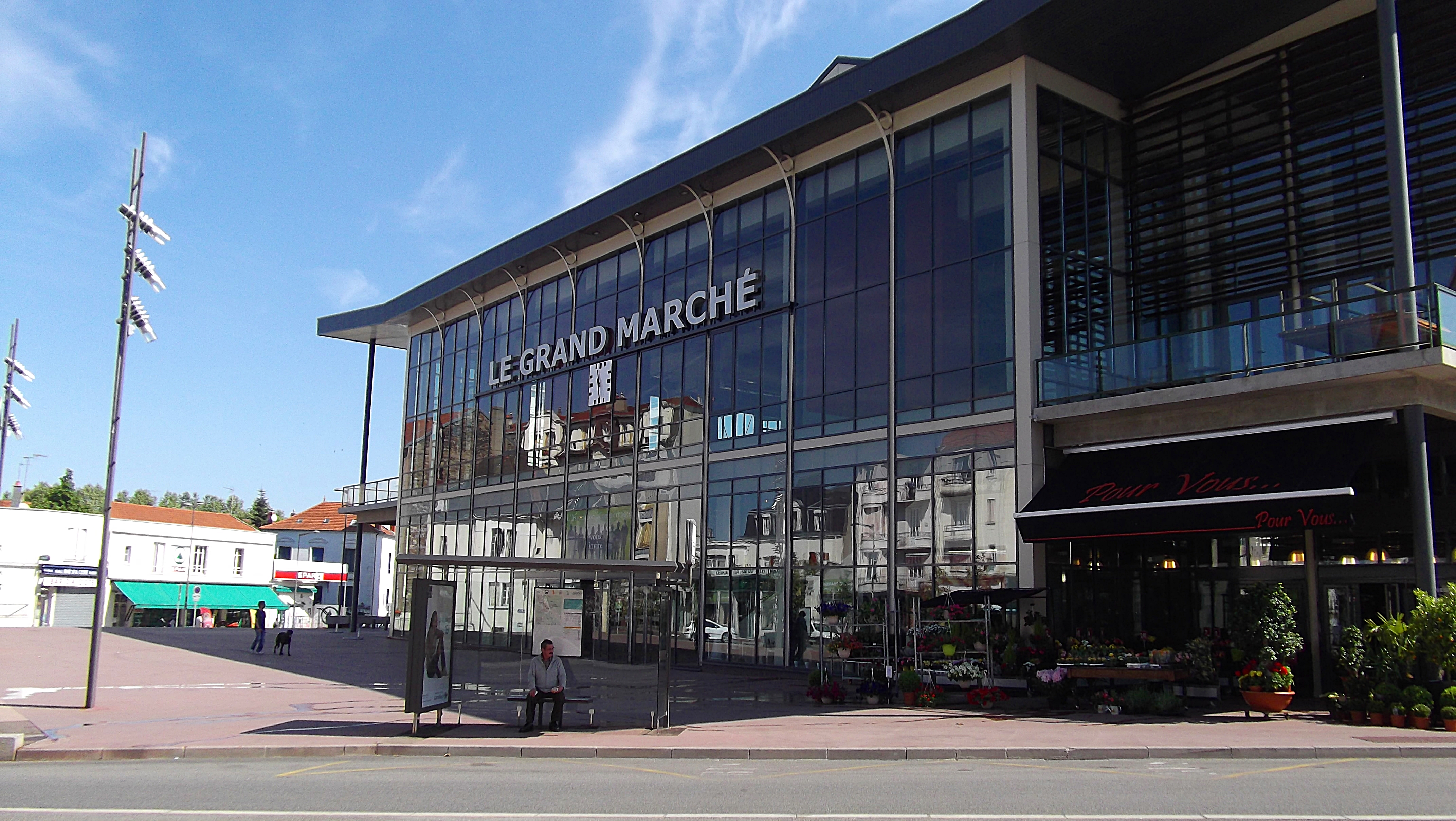 Le Grand Marché de Vichy